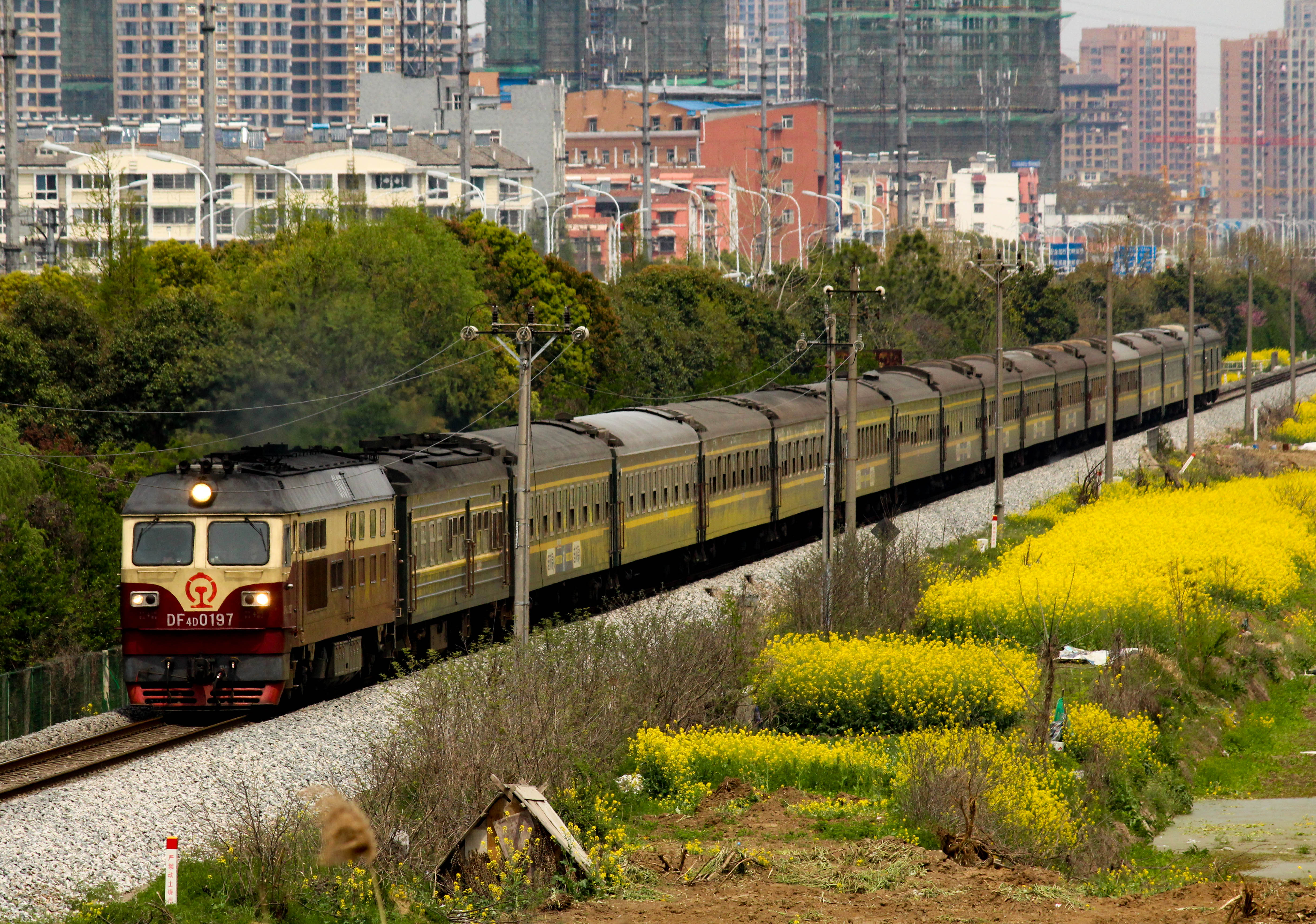 DF4D-0197 Hefei Depot in Shuijiahu-Bengbu Railway